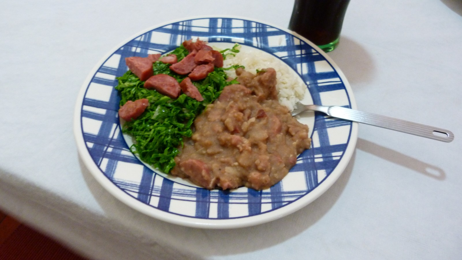 Tutu à Mineira